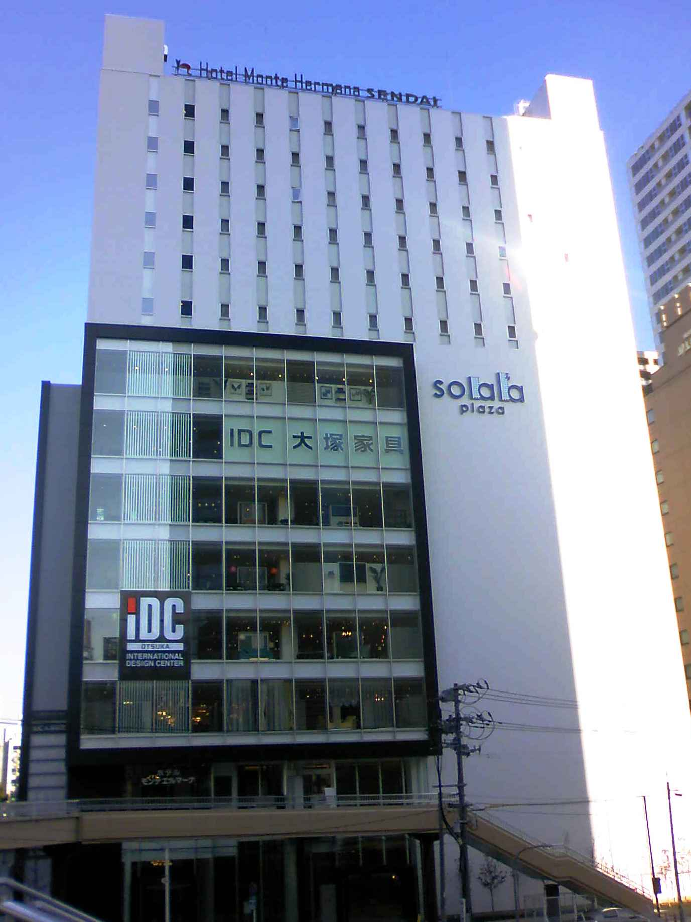 仙台駅西口にあるソララプラザ。 The Solara Plaza. Sendai, Japan.